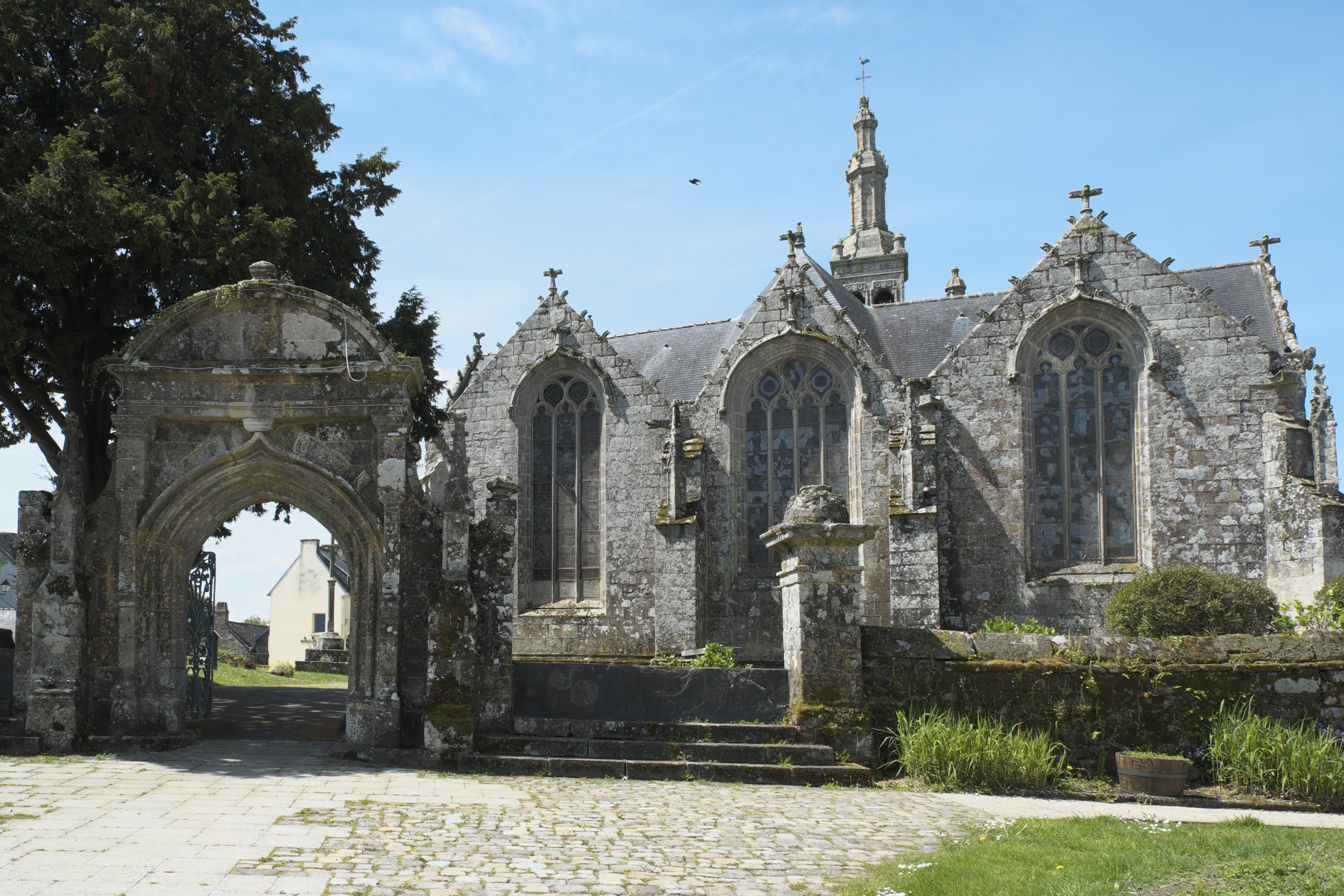 Katholische Pfarrkirche Saint-Thurien in Plogonnec im Département Finistère (Region Bretagne/Frankreich), umfriedeter Pfarrbezirk mit Triumphtor und Kirche